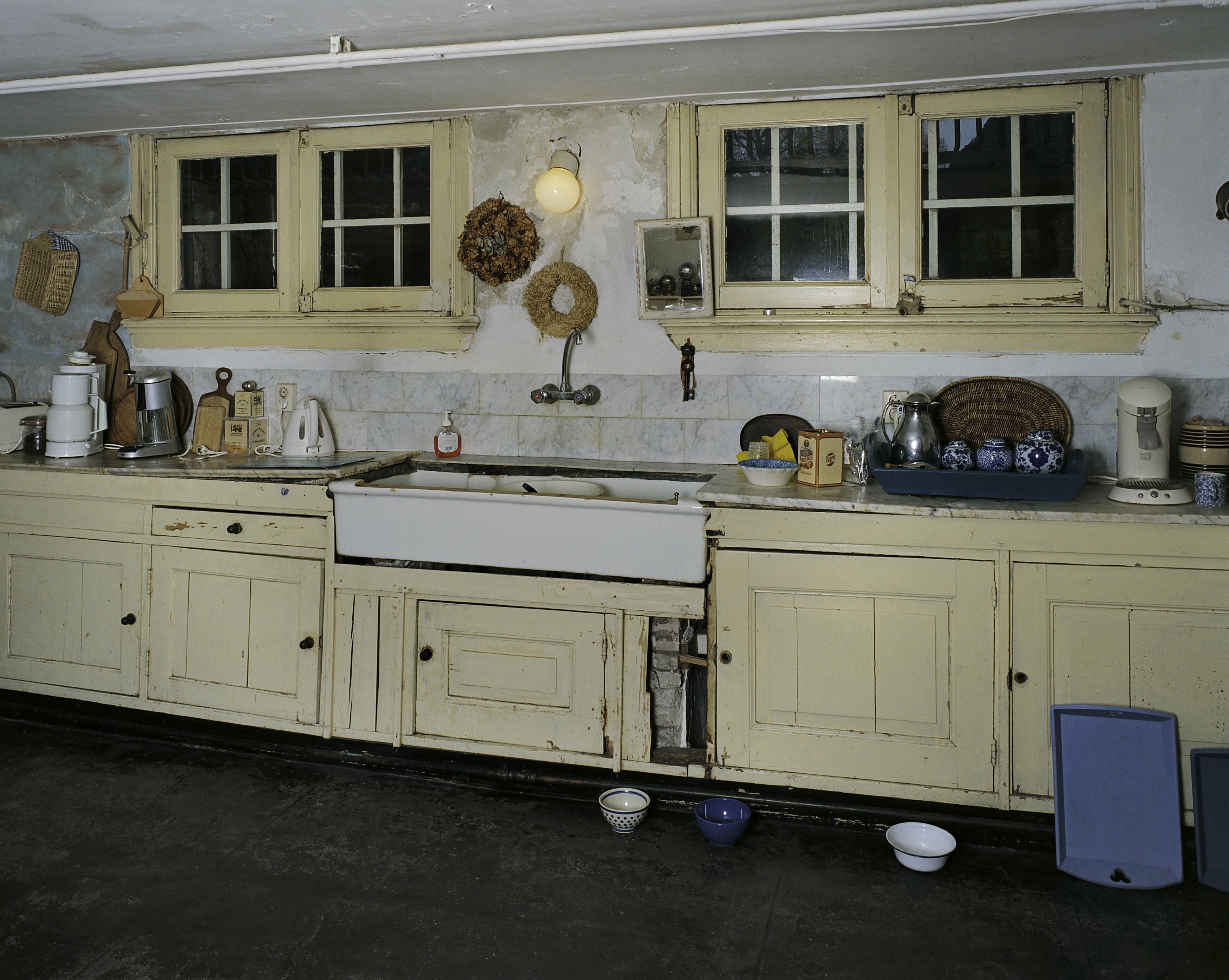 Villa Pera: Interieur kelder, aanrecht in keuken